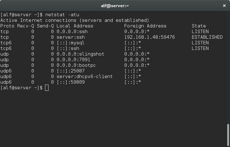 screenshot de xterm con la salida del comando netstat usando el Window Manager, para en Linux, OpenBox.